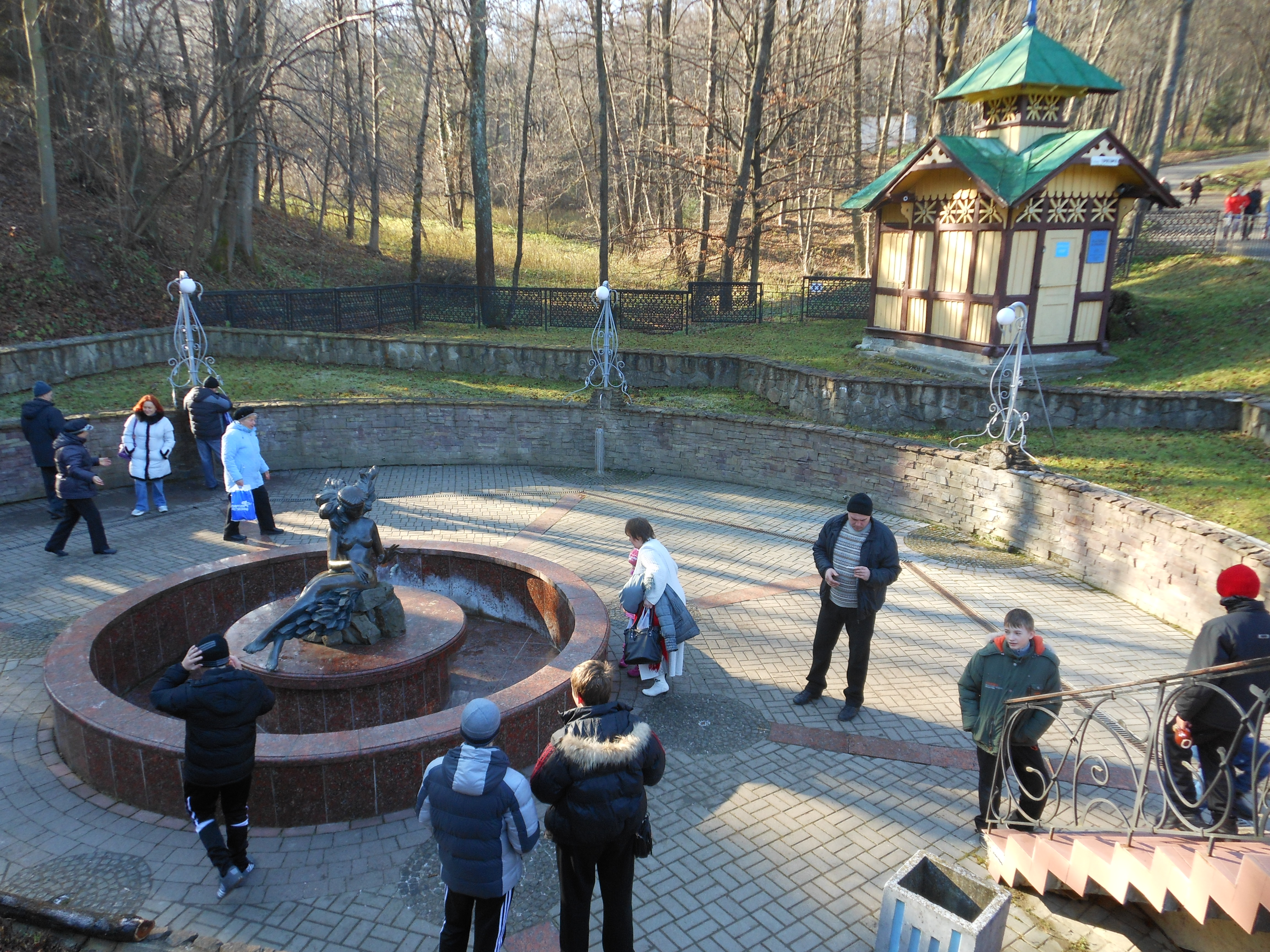 Джерело № 11 (колишня «Юзя») курорту «Трускавець», м. Трускавець